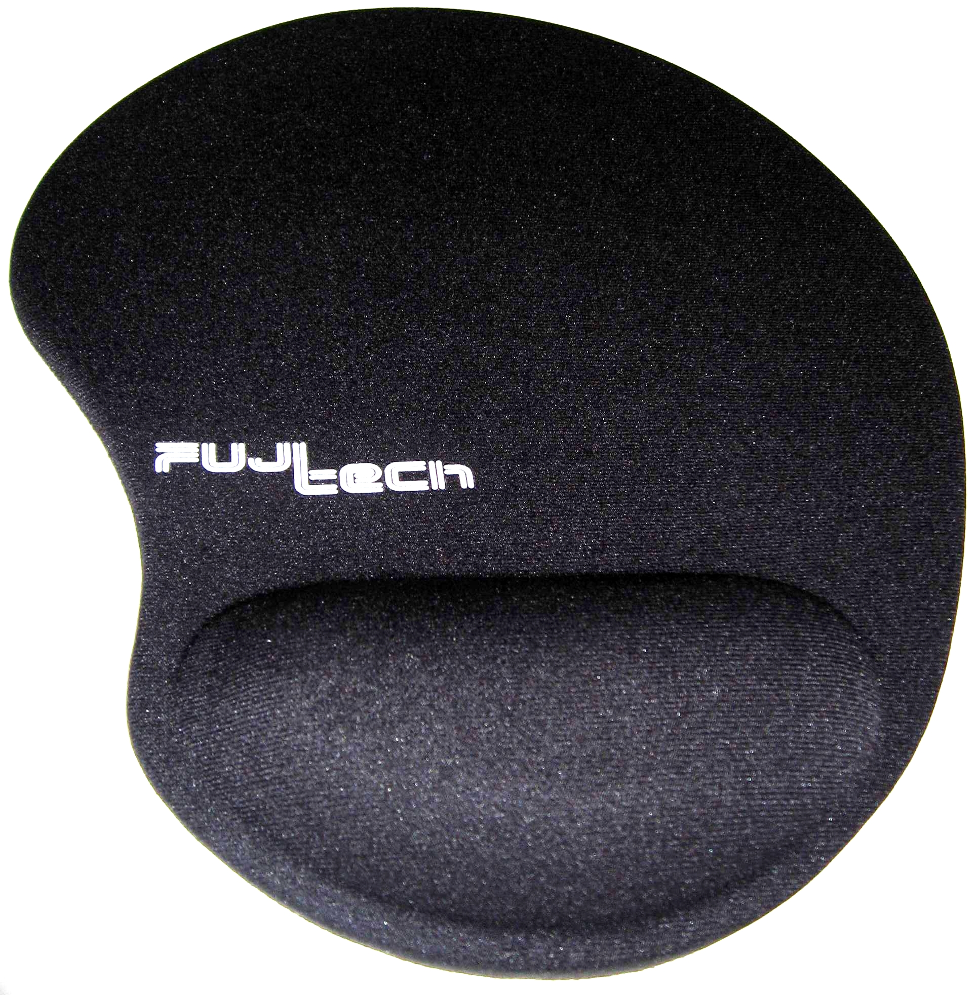 Ergonomic mouse pad